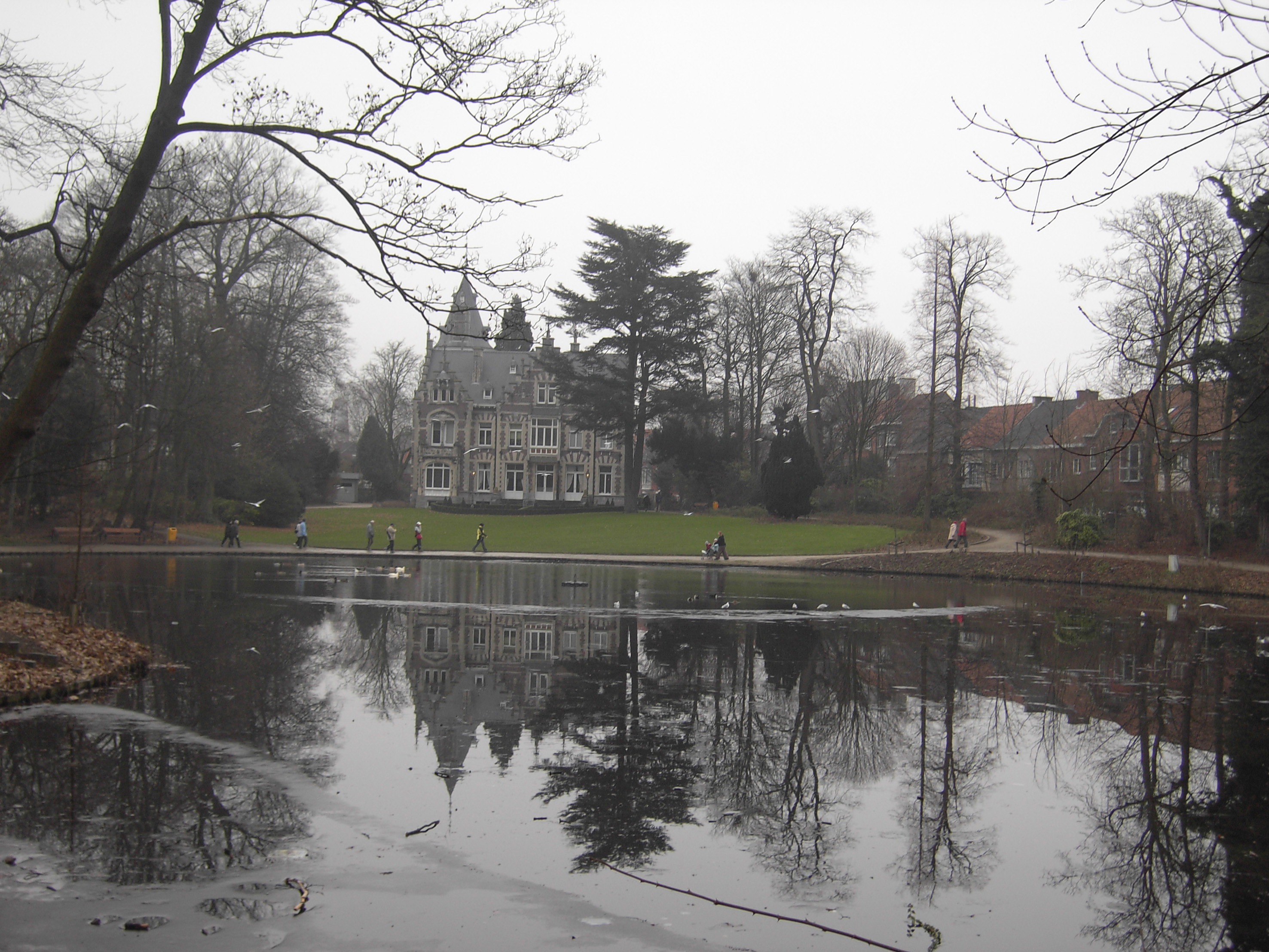 Oudenaarde in Belgium: voormalig park en kasteel van baron Liedts - nu stadspark